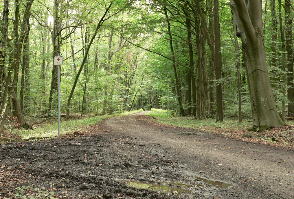 Matschiger Waldweg in der Gaim